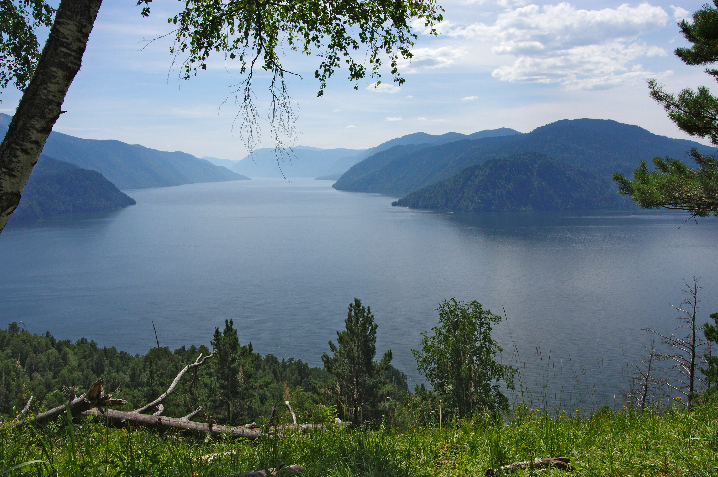 Телецкое озеро, Турочакский район This image is related to the protected area of Russia number 0410032